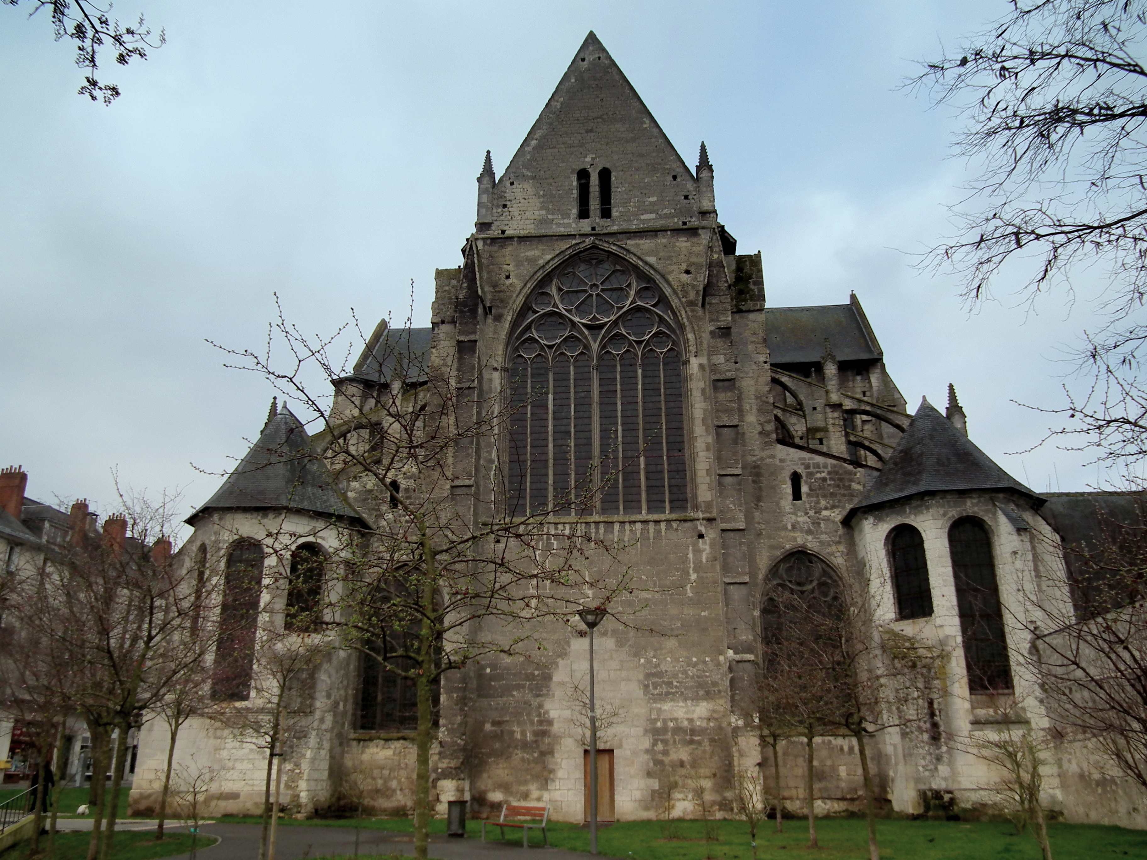 храм в Туре ранним утром